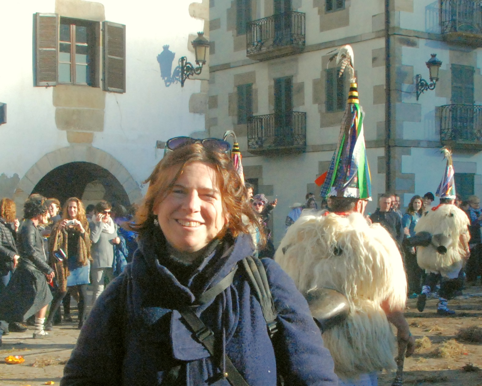 Aitzpea Leizaola antropologoa, Iturengo ihauterian